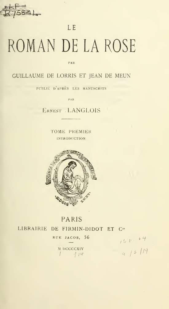 Le roman de la rose. 1 / par Guillaume de Lorris et Jean de Meun ; publié d'apres les manuscrits par Ernest Langlois. - Paris : Firmin-Didot et C., 1914. - 350 p. . Frontespizio